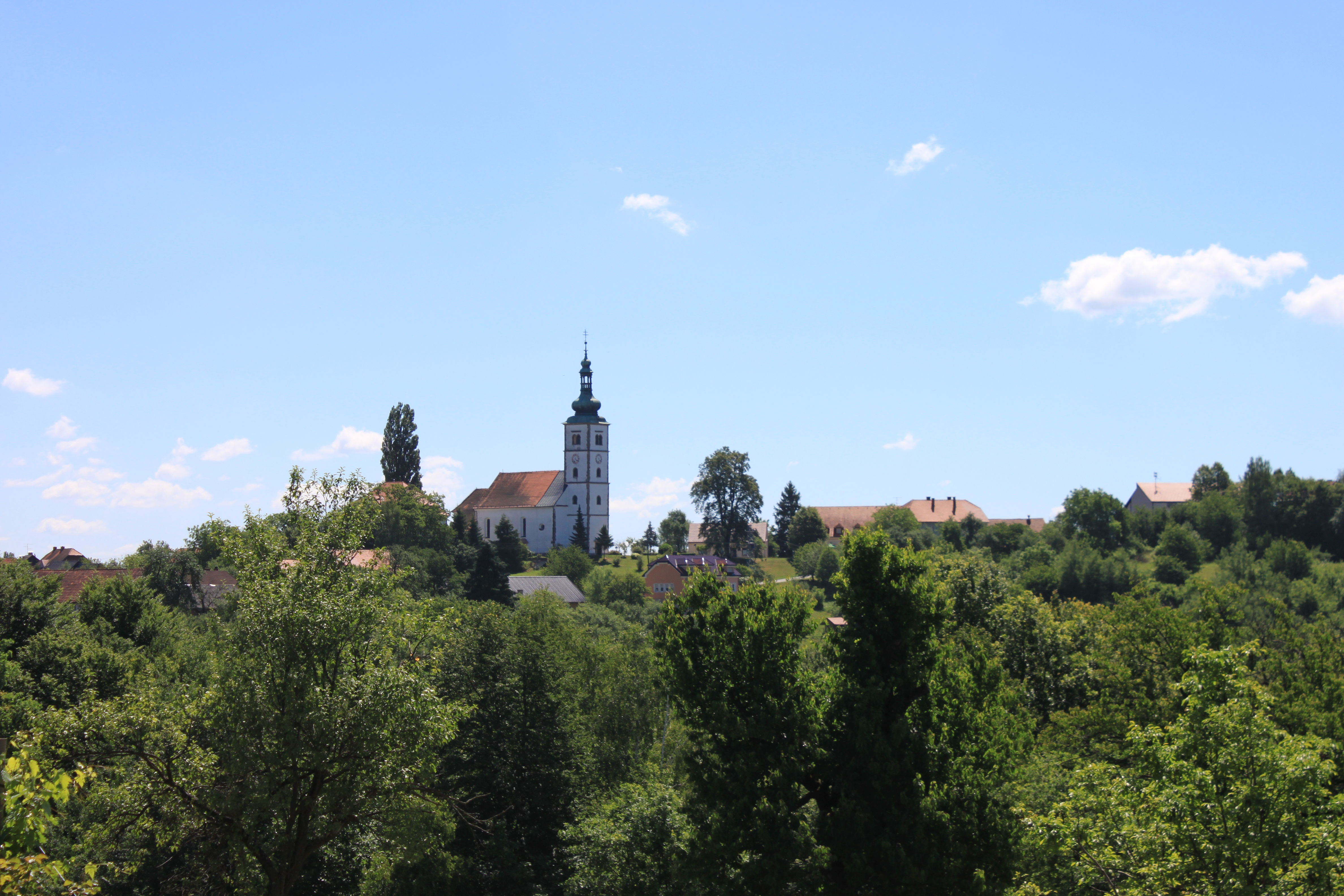 Blick auf die Pfarrkirche von Polenšak